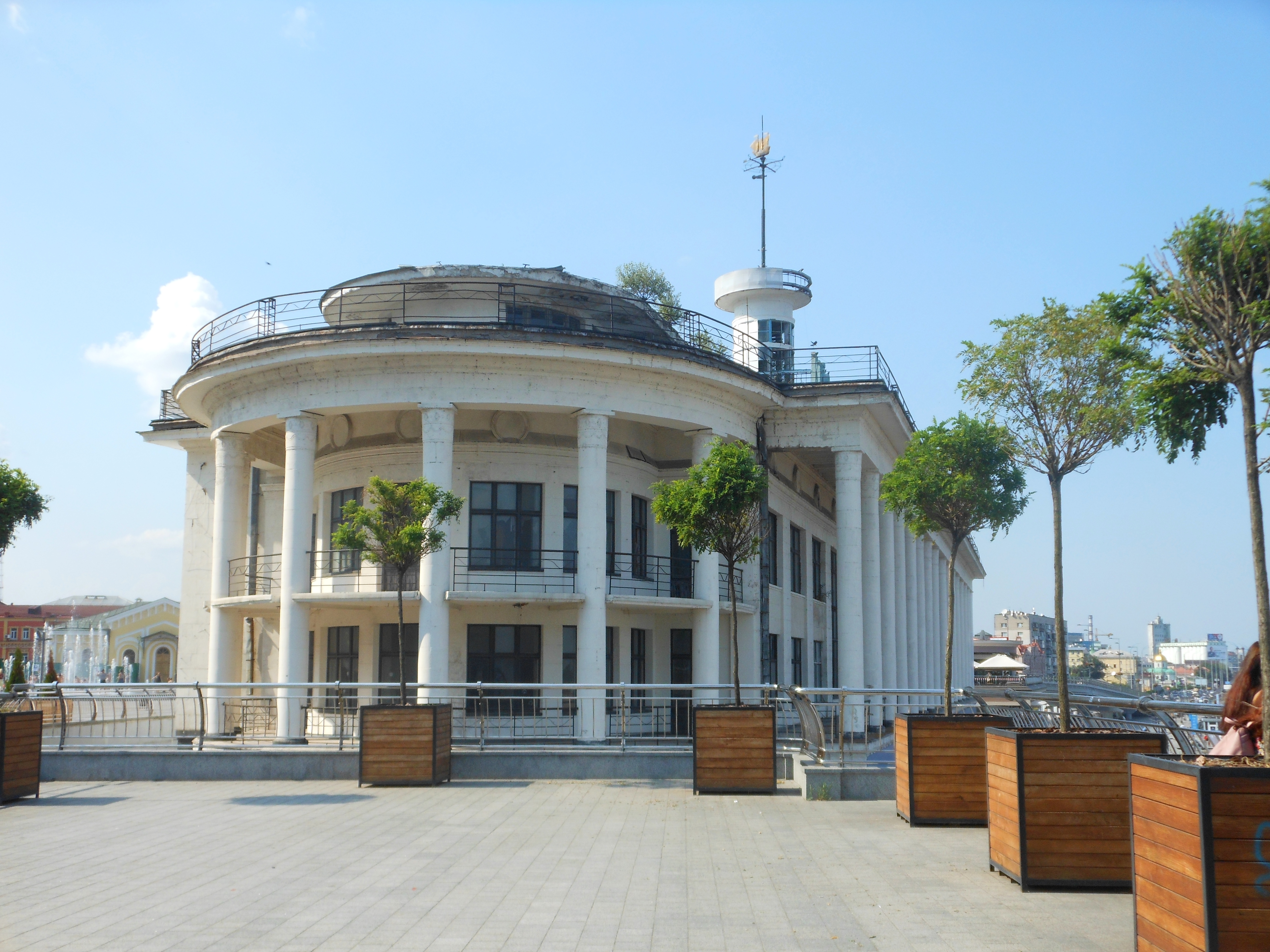 Річковий вокзал, Київ, Поштова пл.